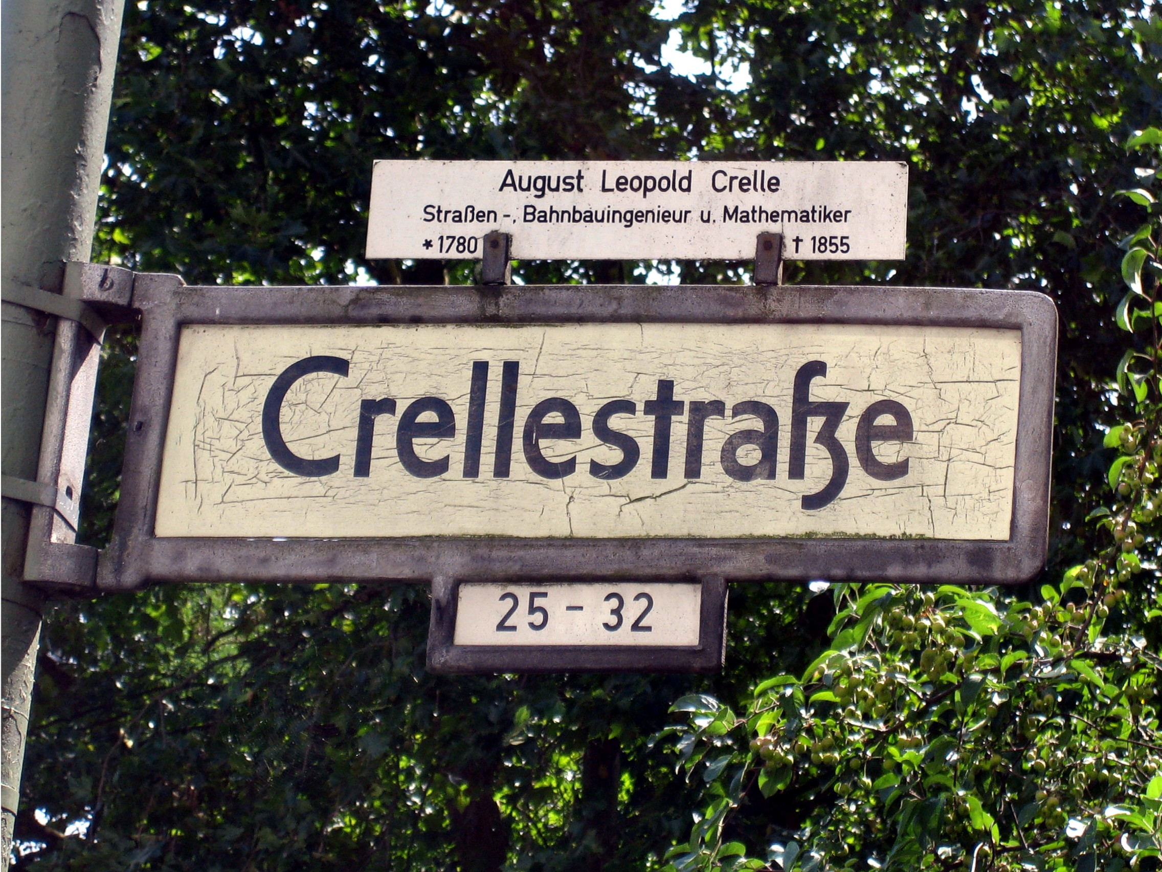 Straßenschild "Crellestraße" in Berlin-Schöneberg zum Andenken an den Ingenieur und Mathematiker August Crelle (1780-1855).